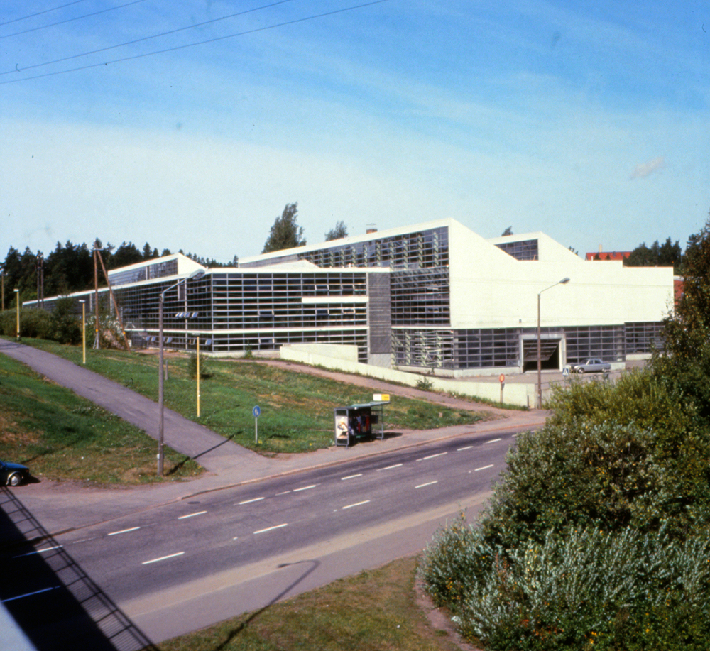 Haagan ammattikoulu, Helsinki, Finland